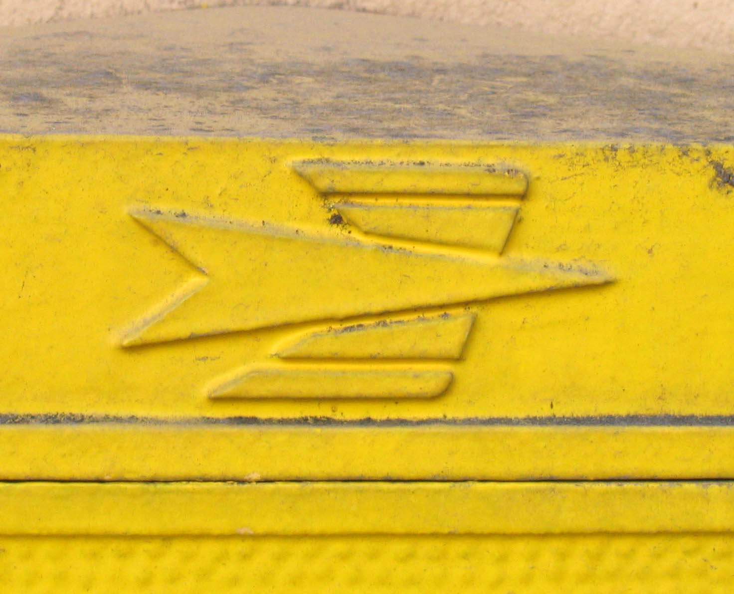 ancien logo des ptt figurant sur les boîtes aux lettres